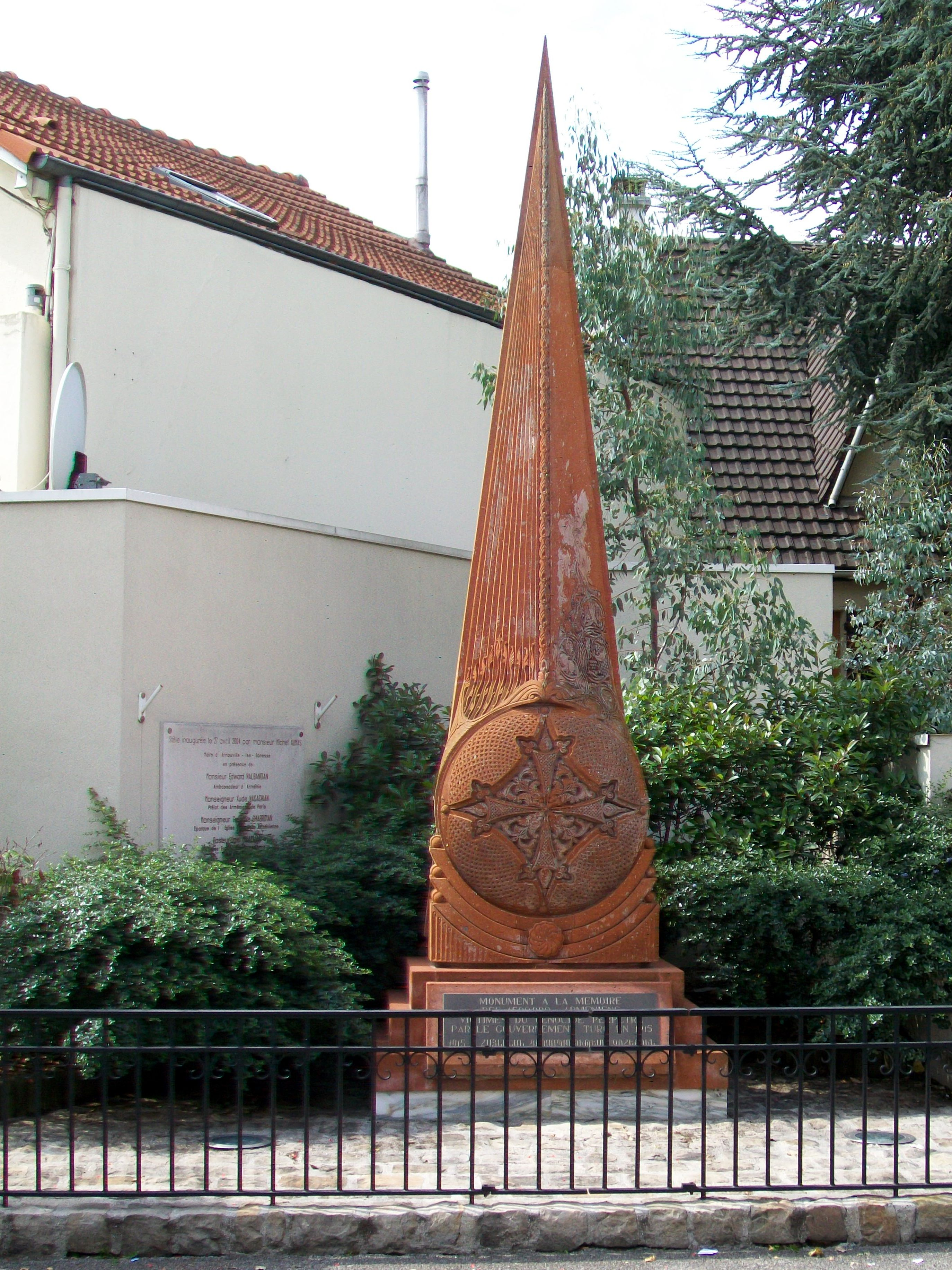 Le monument au génocide arménien de 1915, inauguré le 27 avril 2004 par le maire, Michel AUMAS, l'ambassadeur de l'Arménie, Edward NALBANDIAN, et par plusieurs personnages éclessiastiques. Rue Jean-Jaurès, Arnouville, Val-d'Oise (95), France.